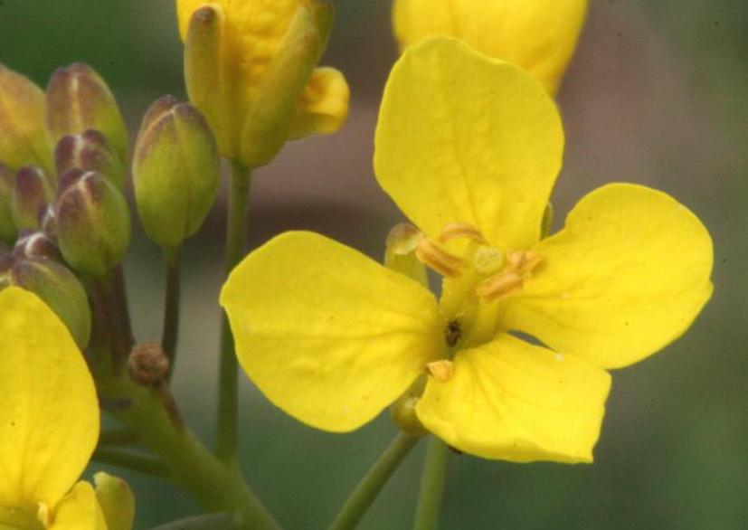 Biscutella laevigata.